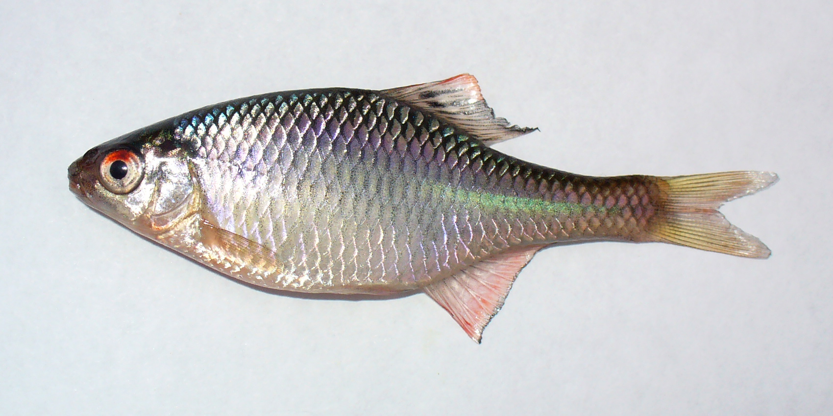 Горчак обыкновенный(Rhodeus amarus)